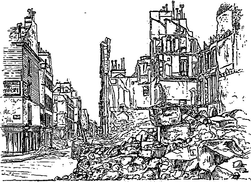 Maison de Mérimée, 52 rue de Lille à Paris, en ruines après un incendie pendant la Commune en 1871.